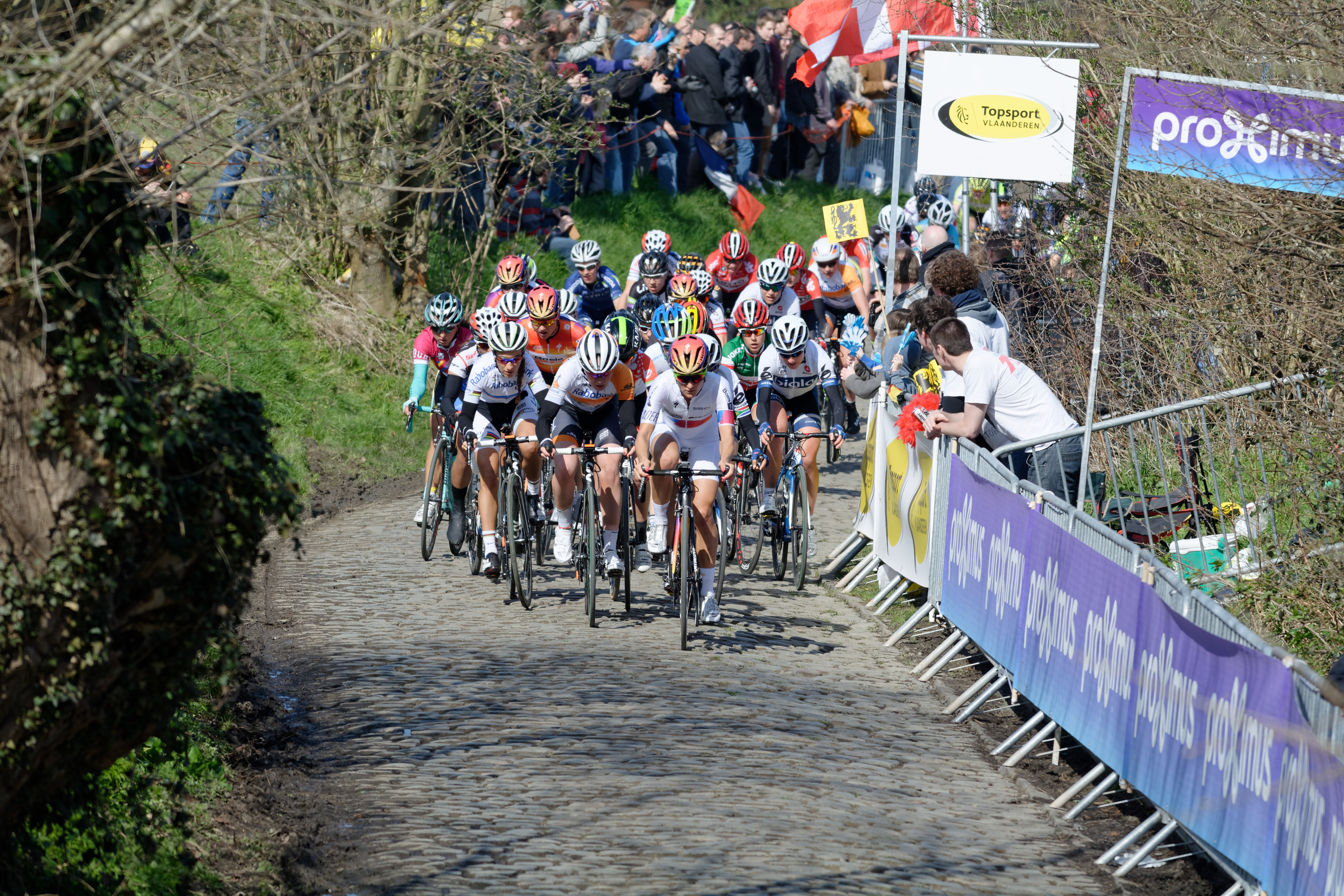 D71_6384_DxO